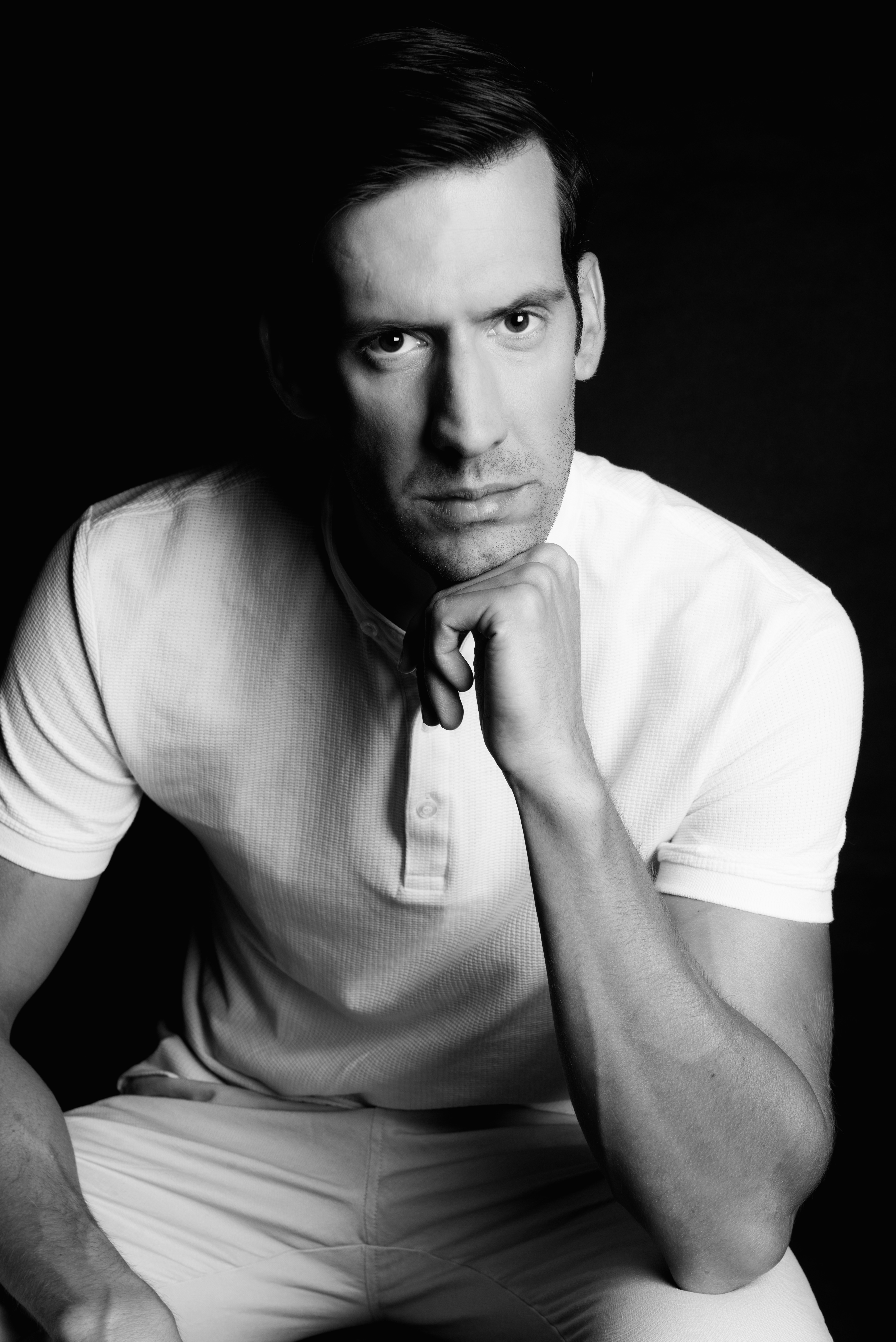 Frederico Amaral_Actor by Leonor Fonseca